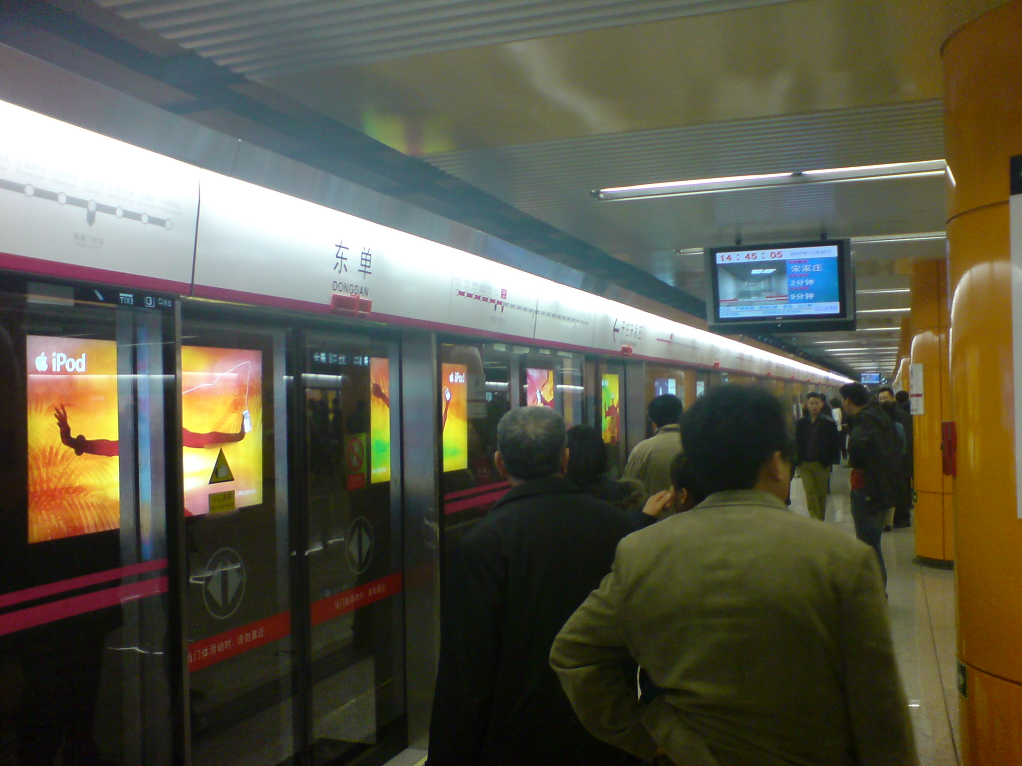 北京地铁5号线东单站站台